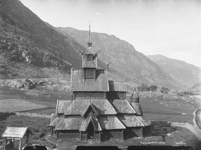 Borgund stavkyrkje (Borgund stave church, Lærdal kommune, Sogn og Fjordane fylke, Norway). Picture taken in the periode 1880 - 1890.